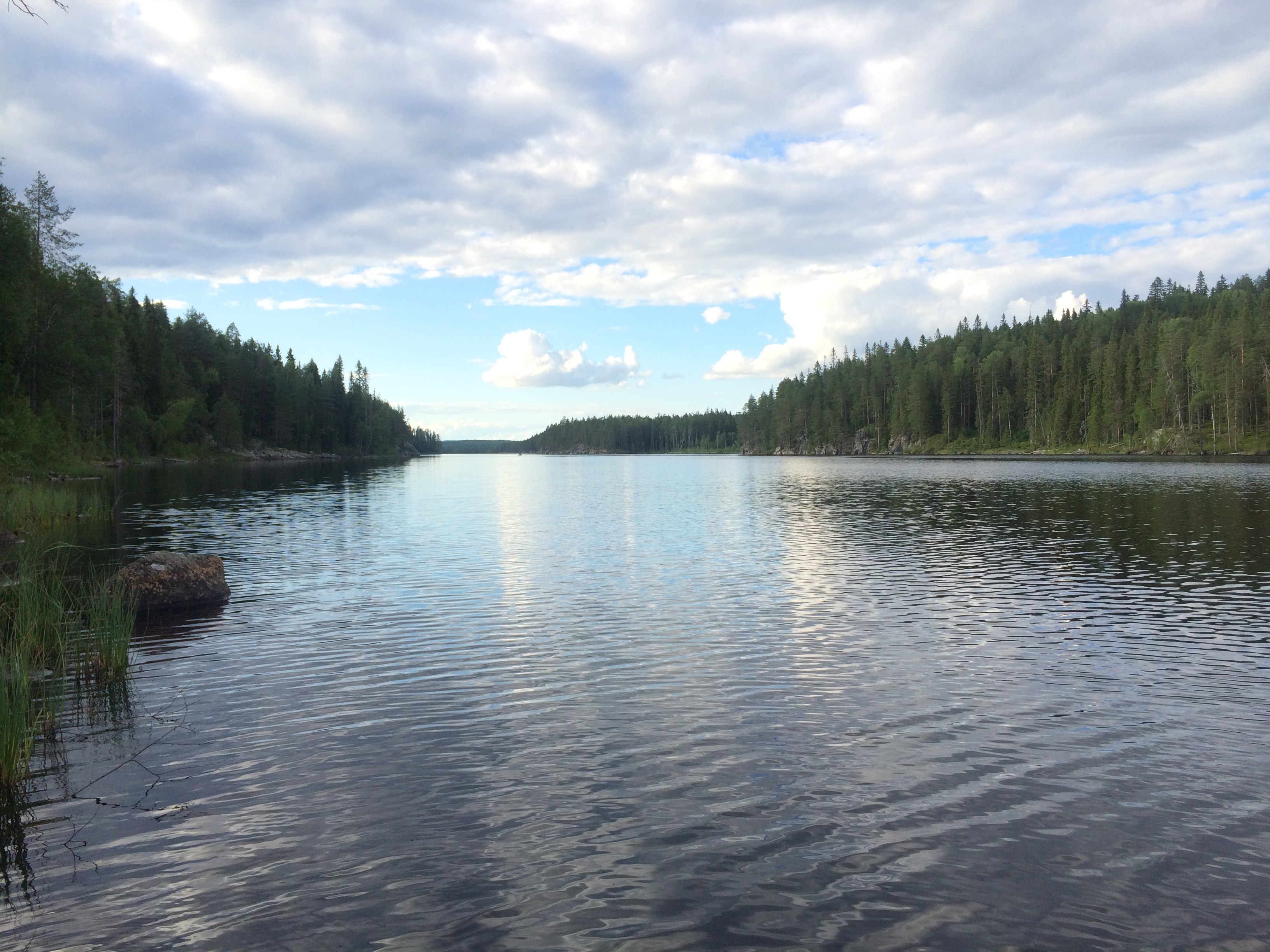 озеро Пизанец